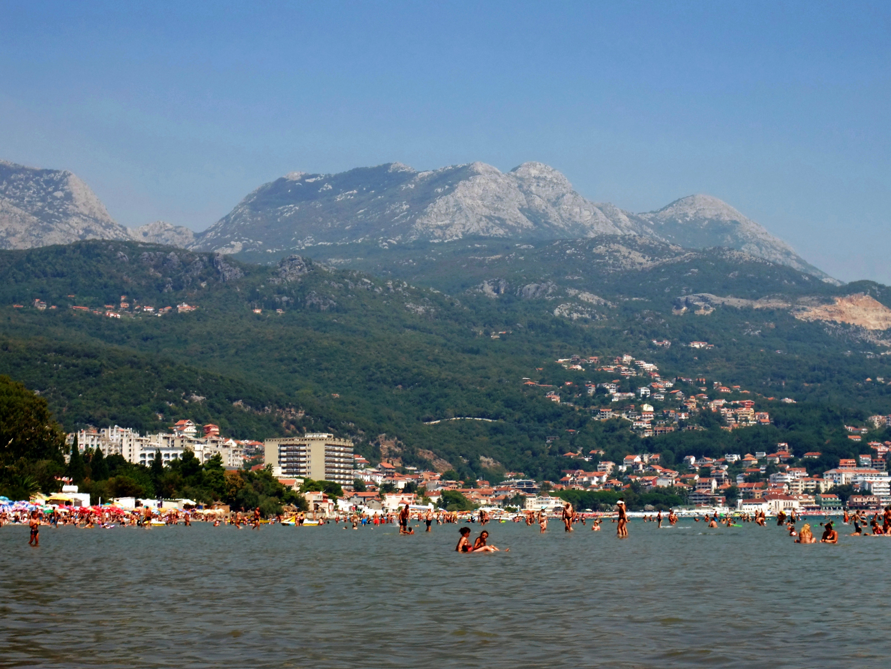 Panorama Igalo